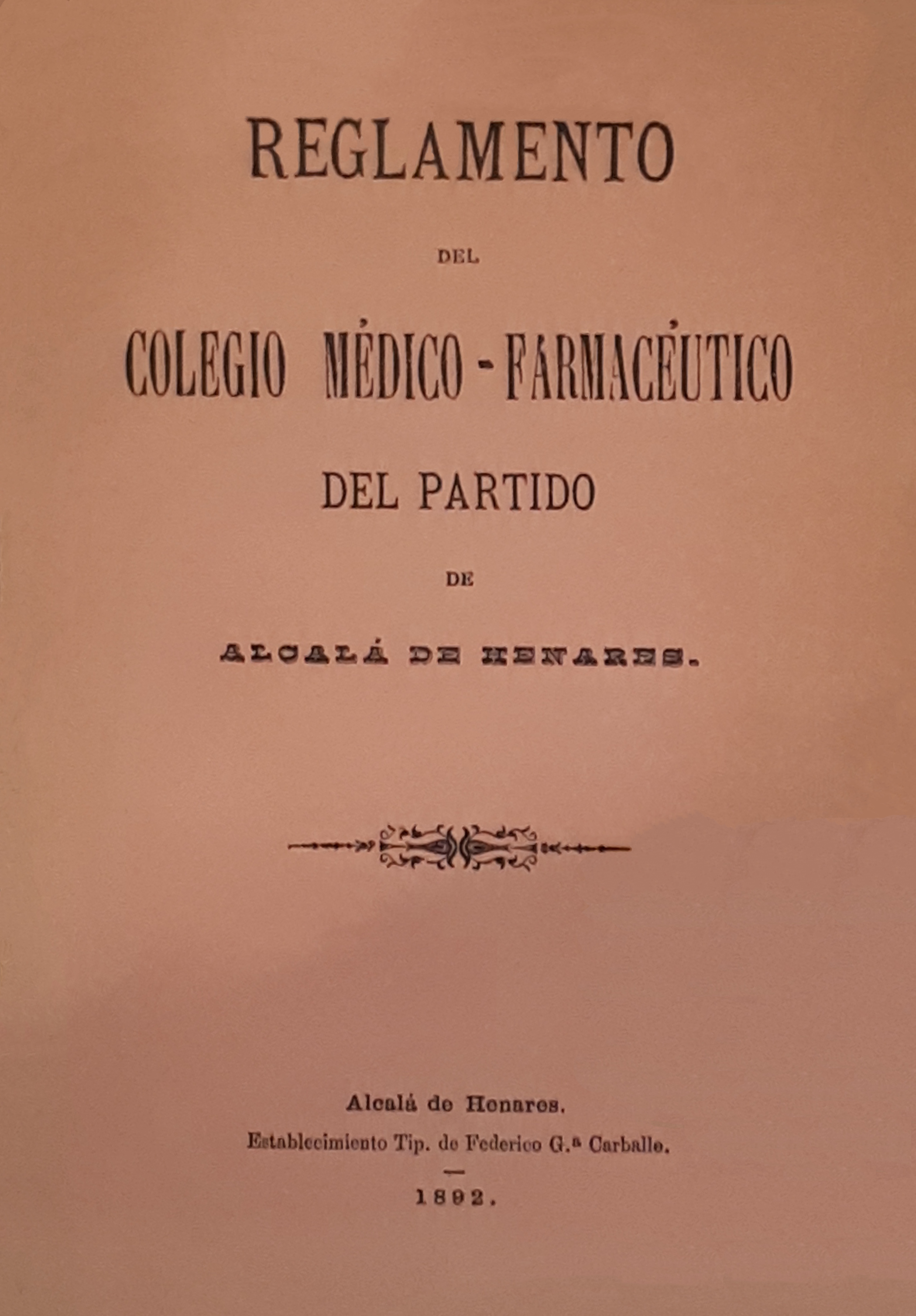 Portada del Reglamento del Colegio Médico-Farmacéutico del partido de Alcalá de Henares. Impreso en 1892, en los talleres tipográficos de Federico García Carballo.